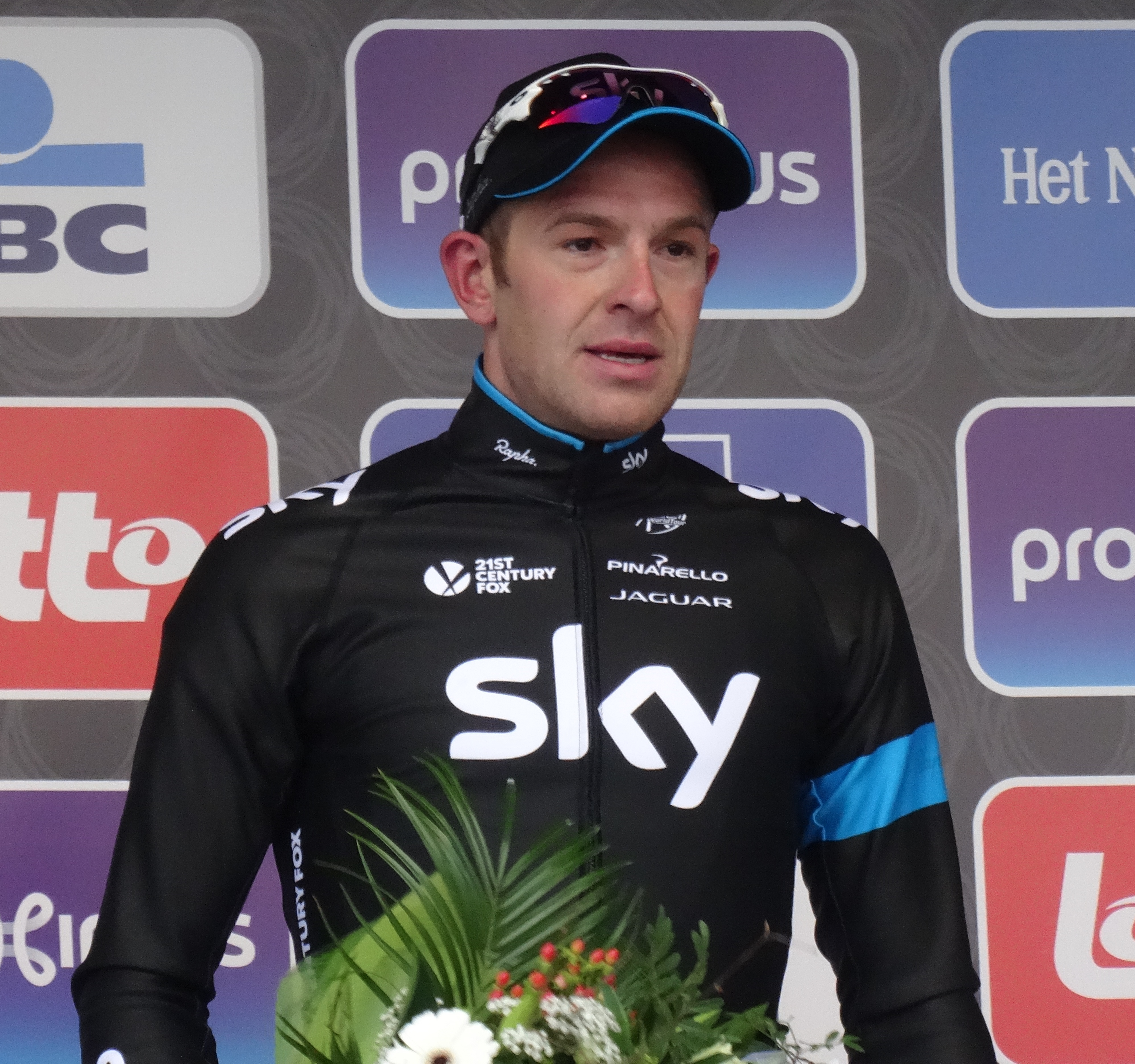 Reportage réalisé le samedi 28 février à l'occasion du départ et de l'arrivée du Circuit Het Nieuwsblad 2015 à Gand, Belgique.